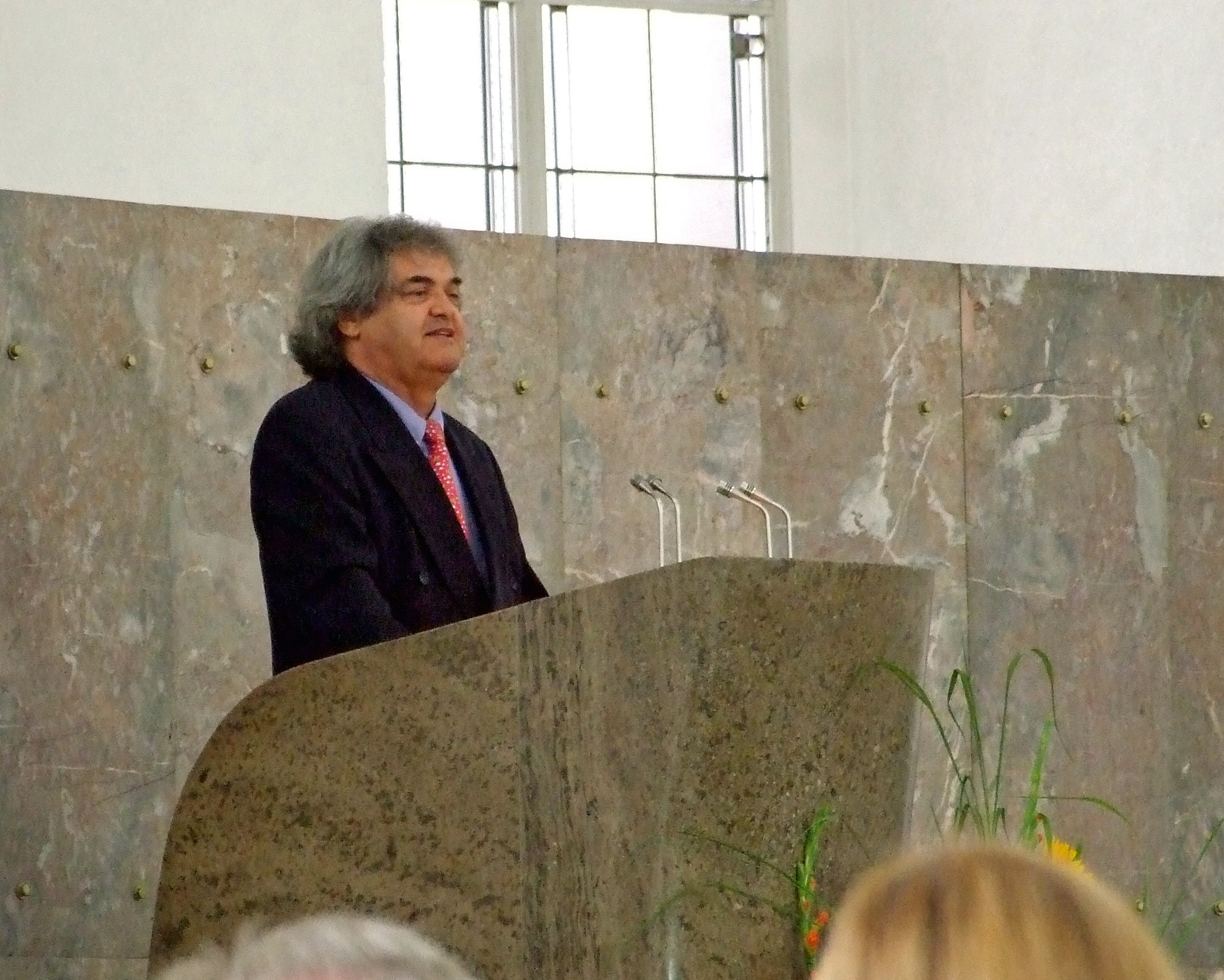 Laudator Helmut Markwort, bei seiner Rede in der Paulskirche 2007